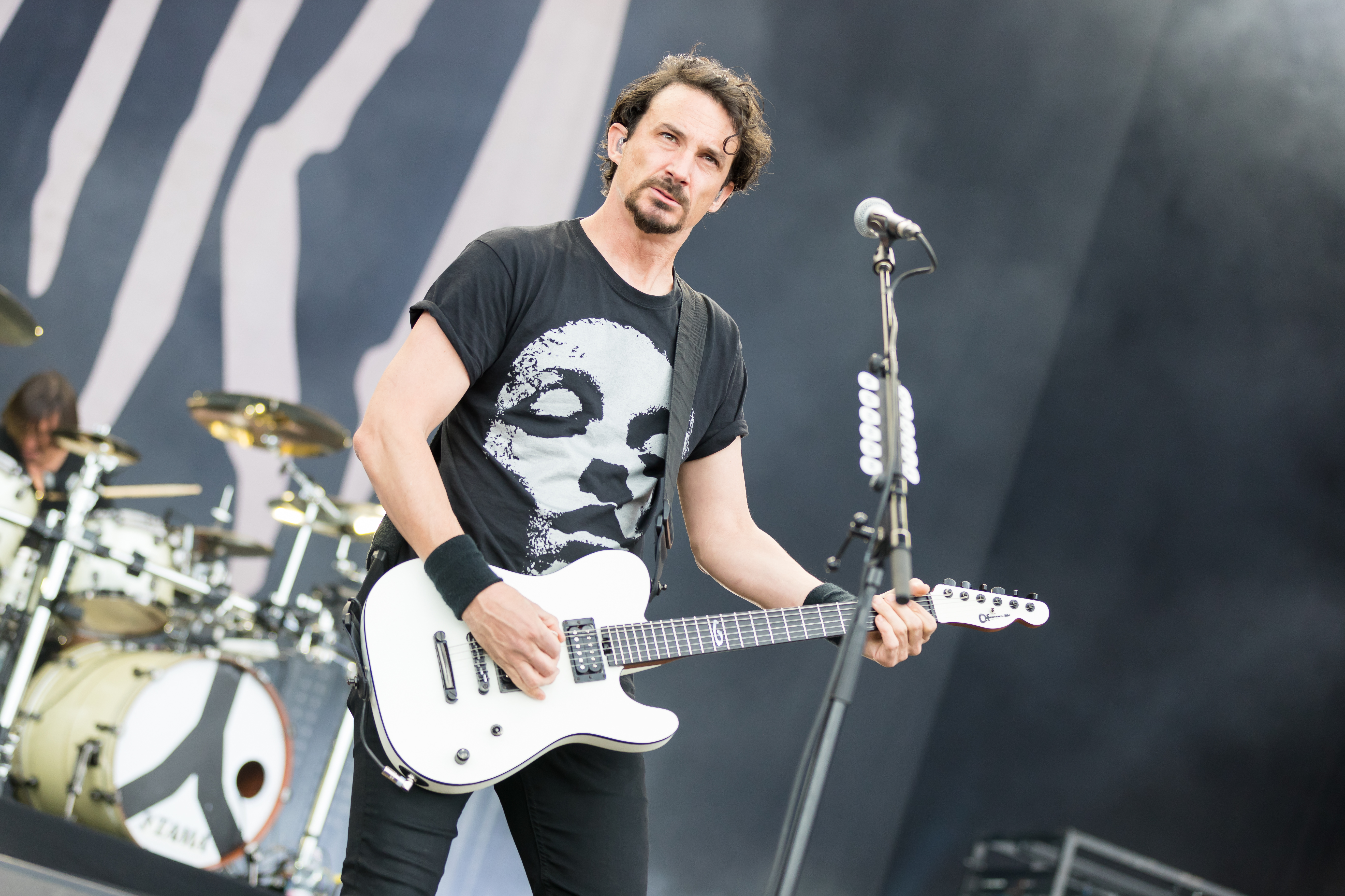 Gojira during Rock am Ring at Nürburgring, Nürburg, Rheinland Pfalz, Germany on 2017-06-04, Photo: Sven Mandel